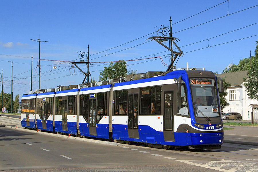 Tramwaj Protram 405N w nowych barwach i z nowym numerem taborowym na linii nr 24 w Krakowie.